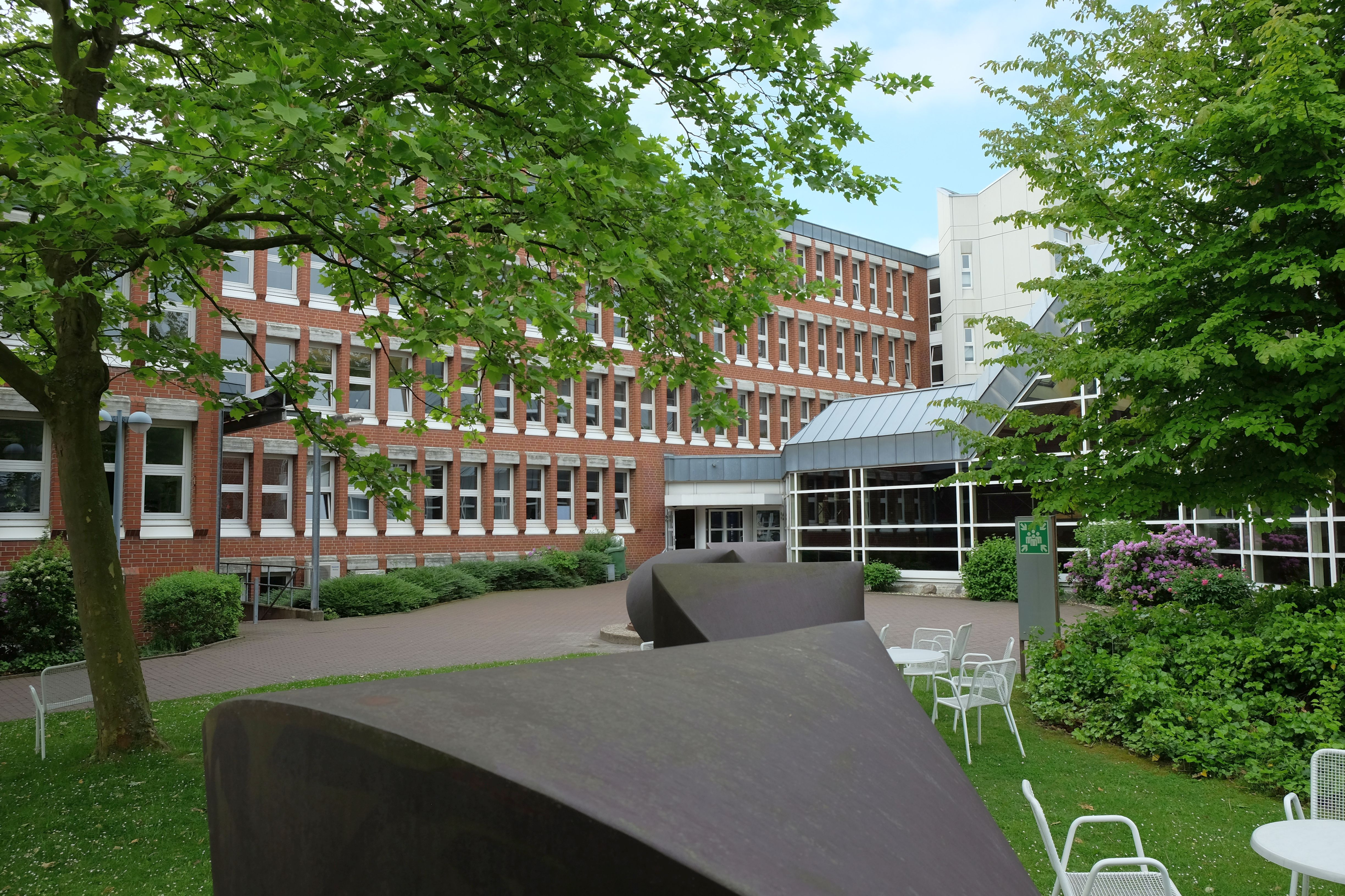 QUA-LiS Campus